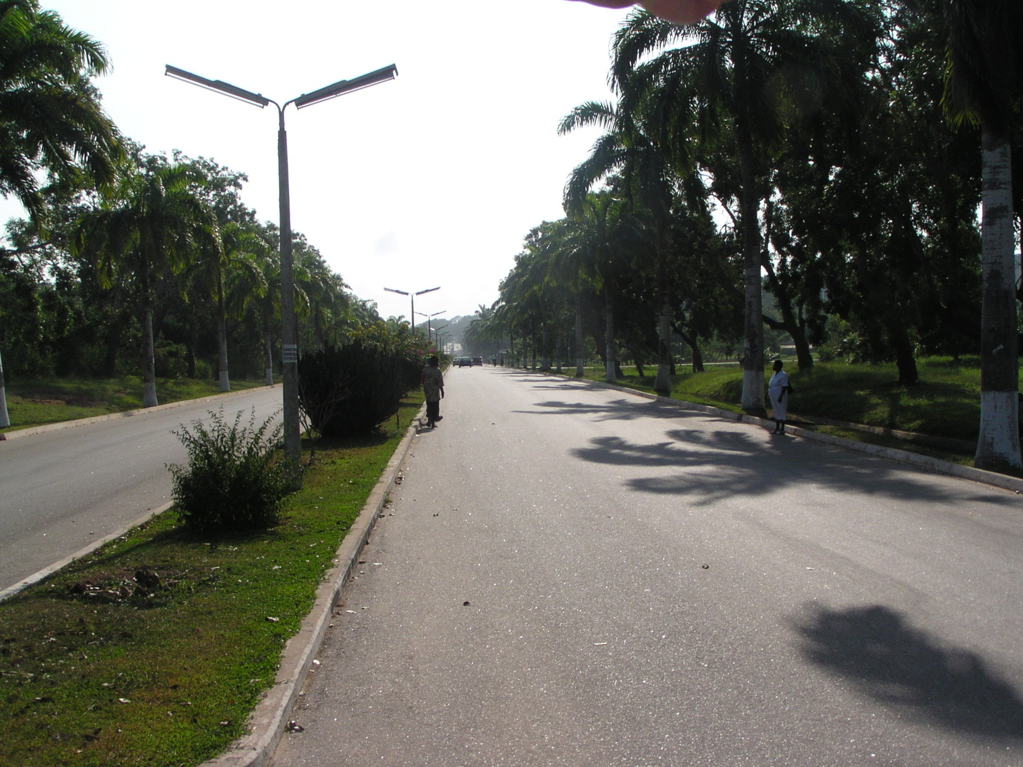 Auffahrt zur University of Cape Coast